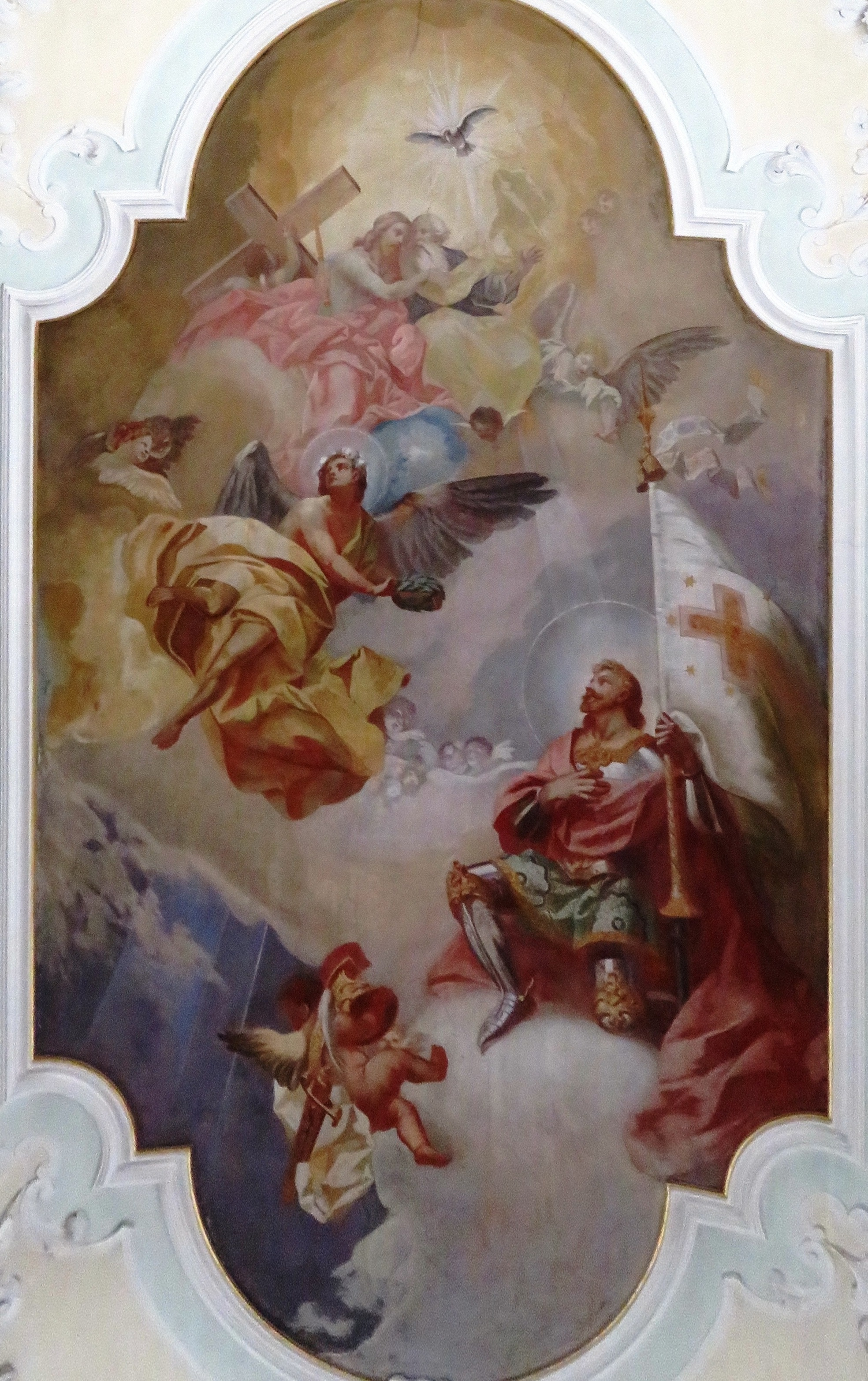 Stein im Allgäu, kath. Kirche St. Mauritius, Deckengemälde von Jakob Huwyler II.: Dreifaltigkeit und Apotheose des hl. Mauritius